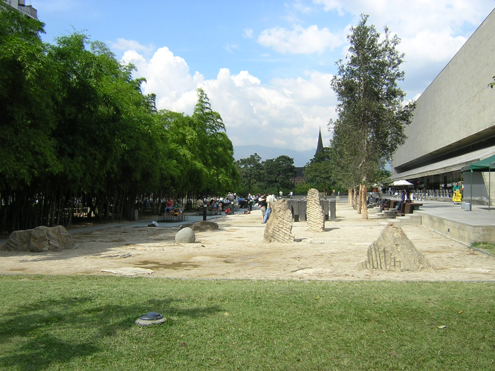 Parque de los Pies Descalzos, Medellín, Colombia